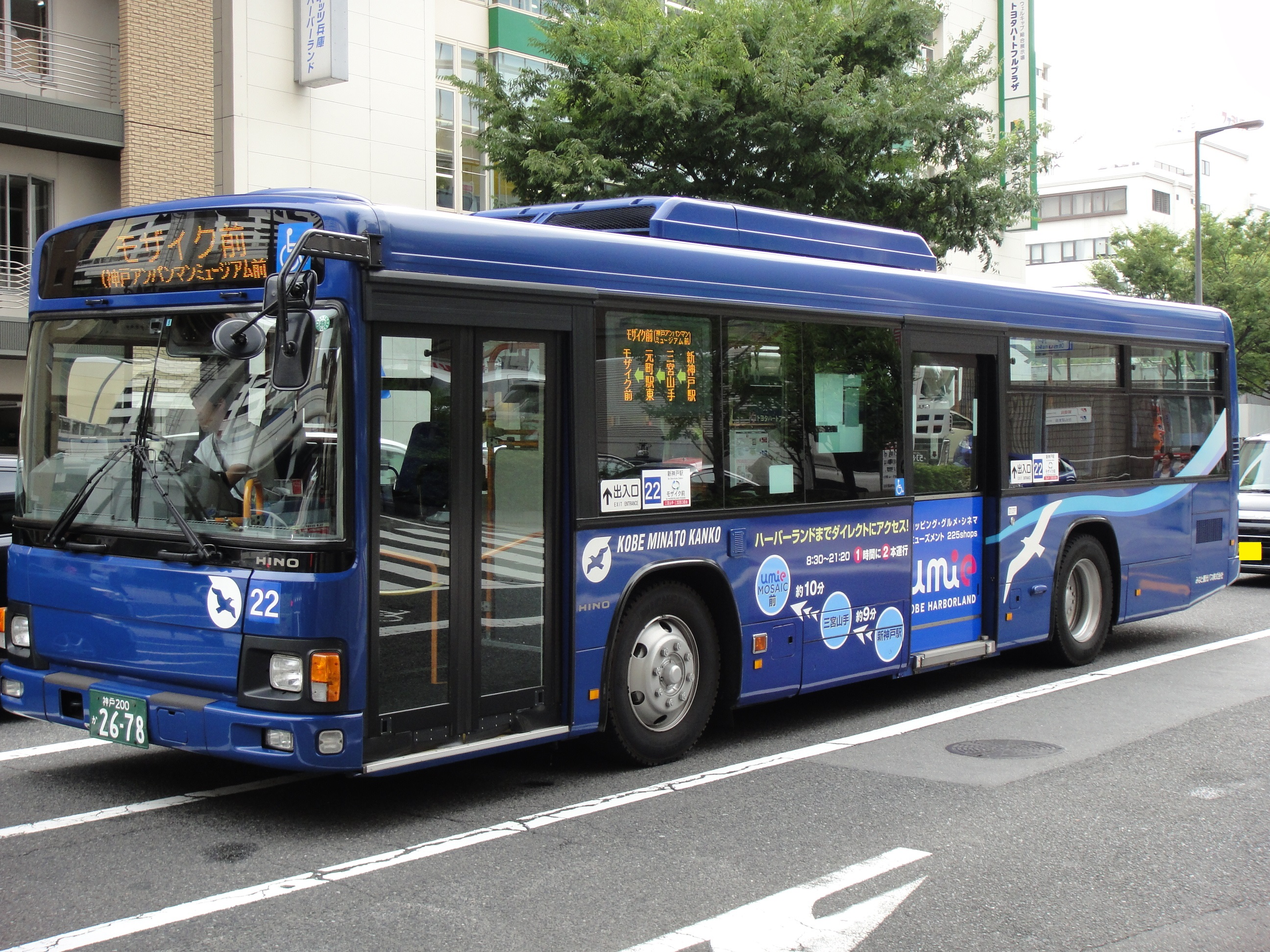 神戸みなと観光バスの「ｕｍｉｅ」仕様車両